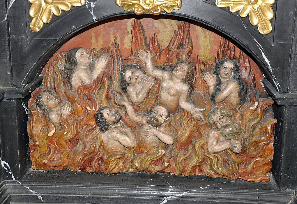 Fegefeuer, Darstellung im Benhaus STans NW